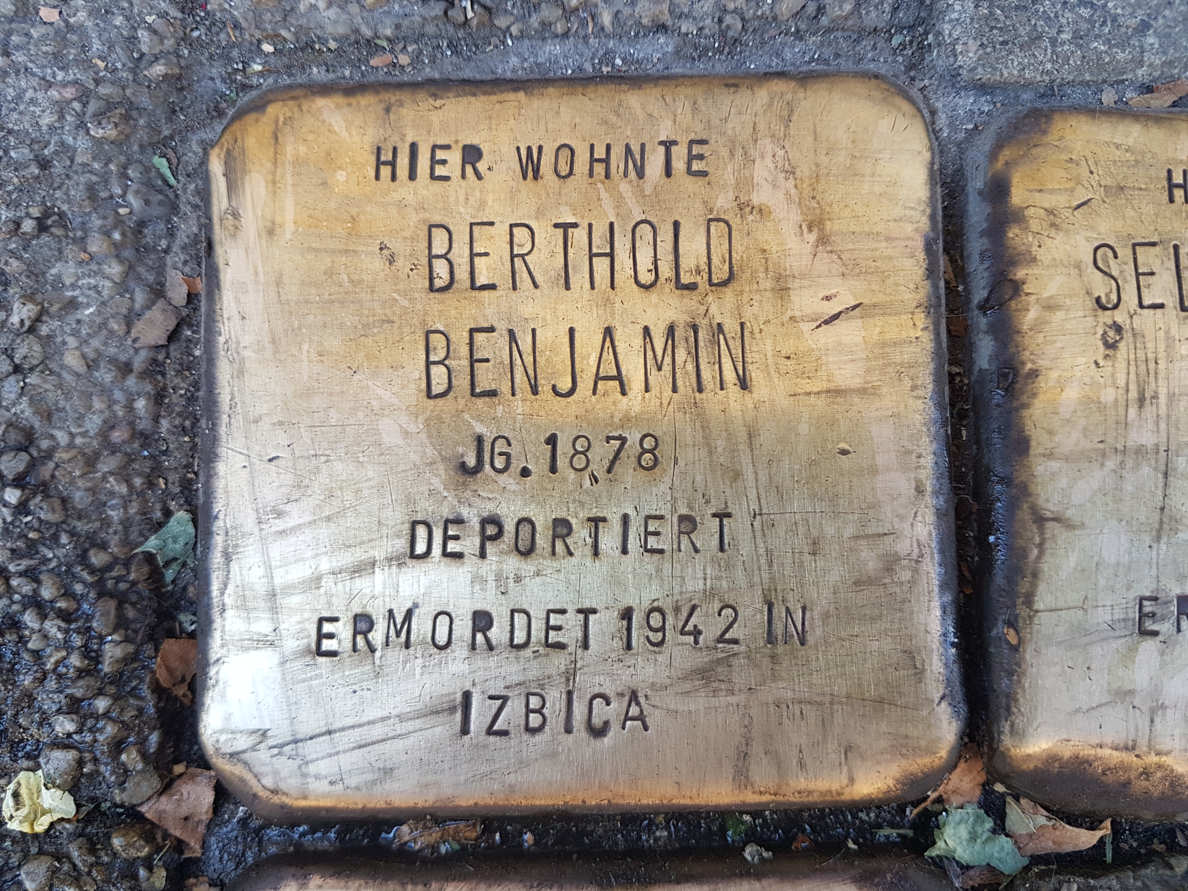 Stolperstein Duisburg Berthold Benjamin